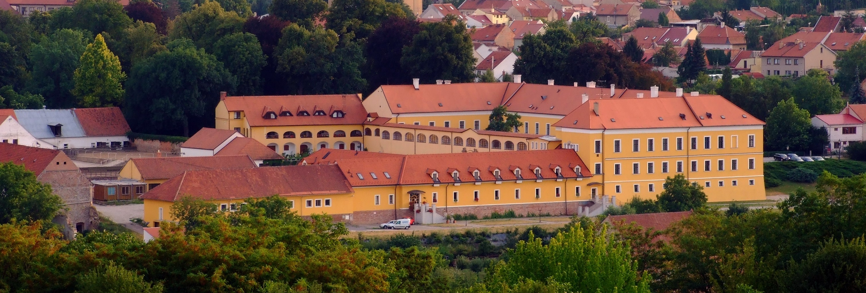 Brno-Líšeň - Líšeňský zámek ve Staré Líšni focený od Kostelíčku